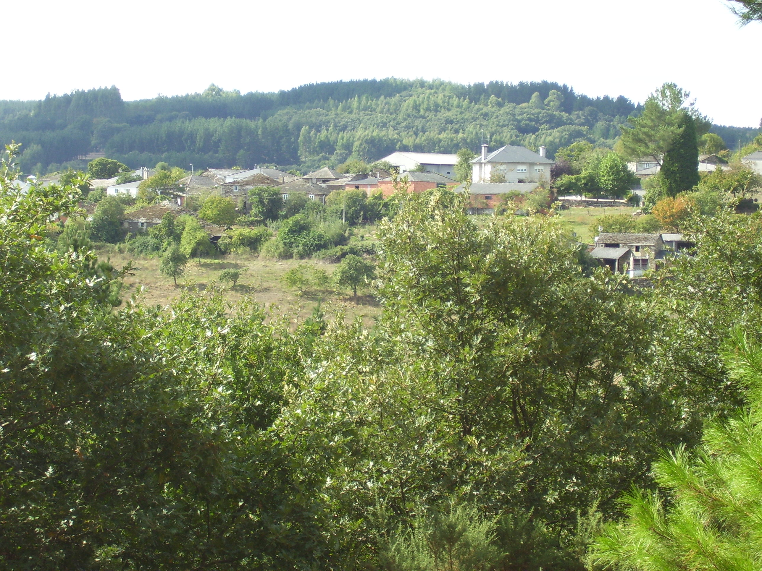 Lugar de Zolle, parroquia de Zolle, Guntín